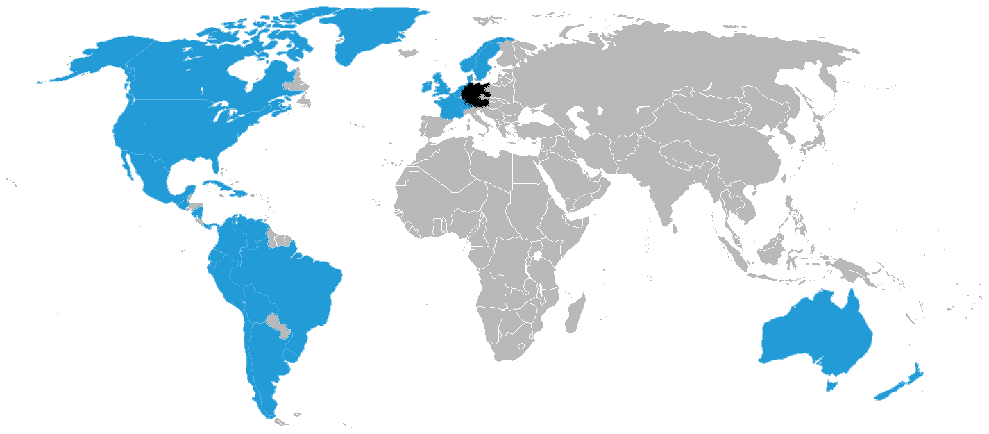 Teilnehmende Staaten an der Konferenz von Evian.